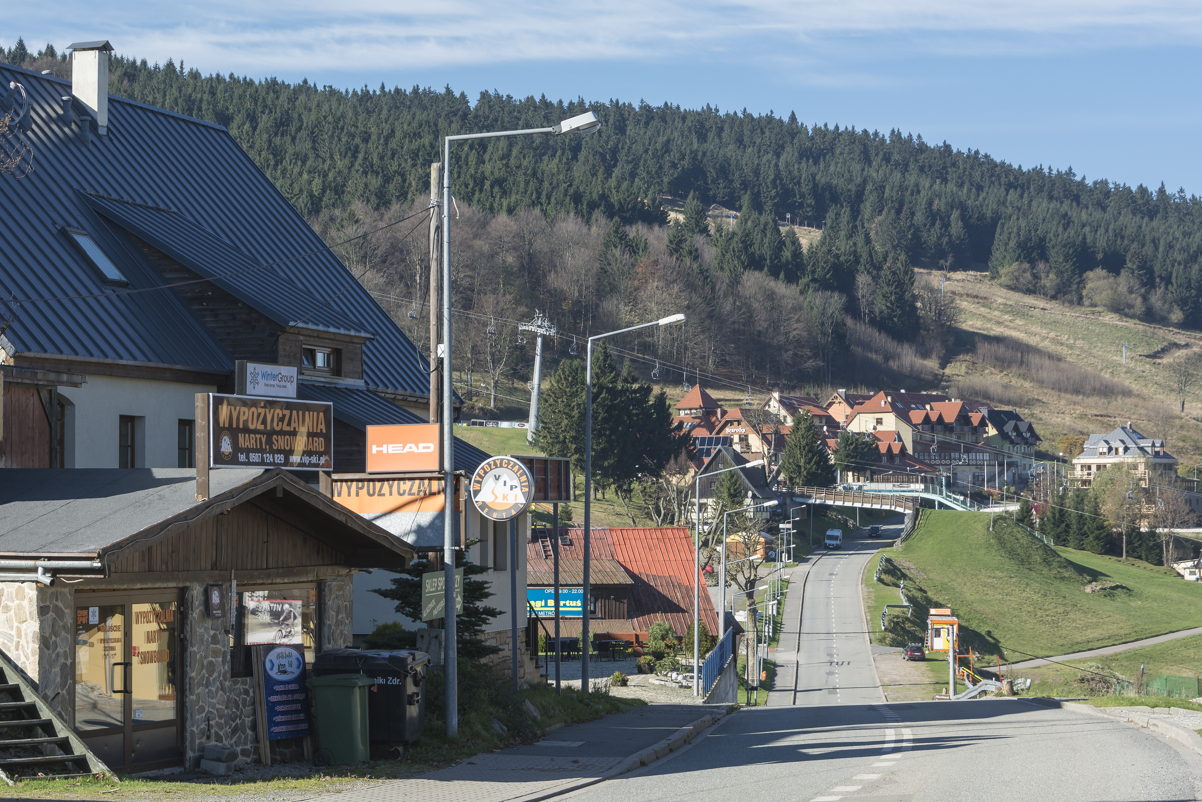 Zieleniec